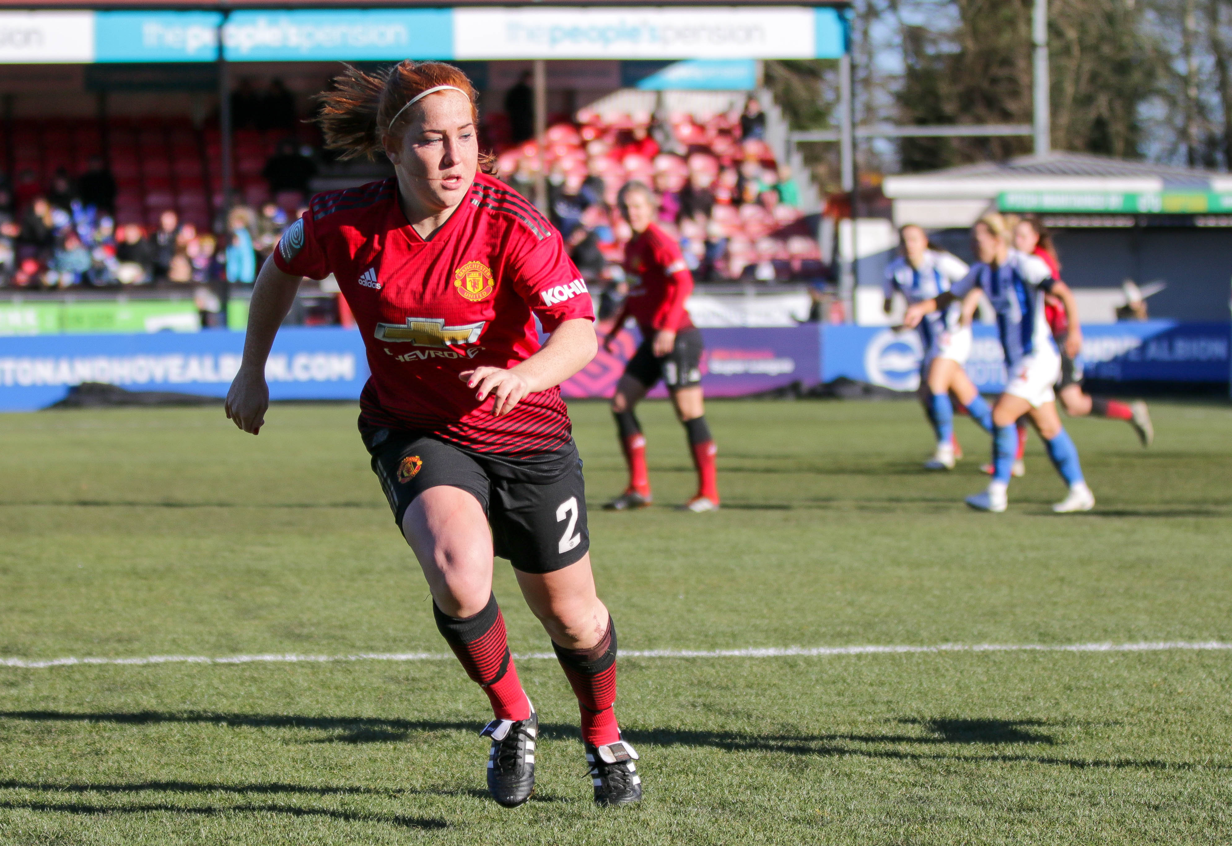 M Harris